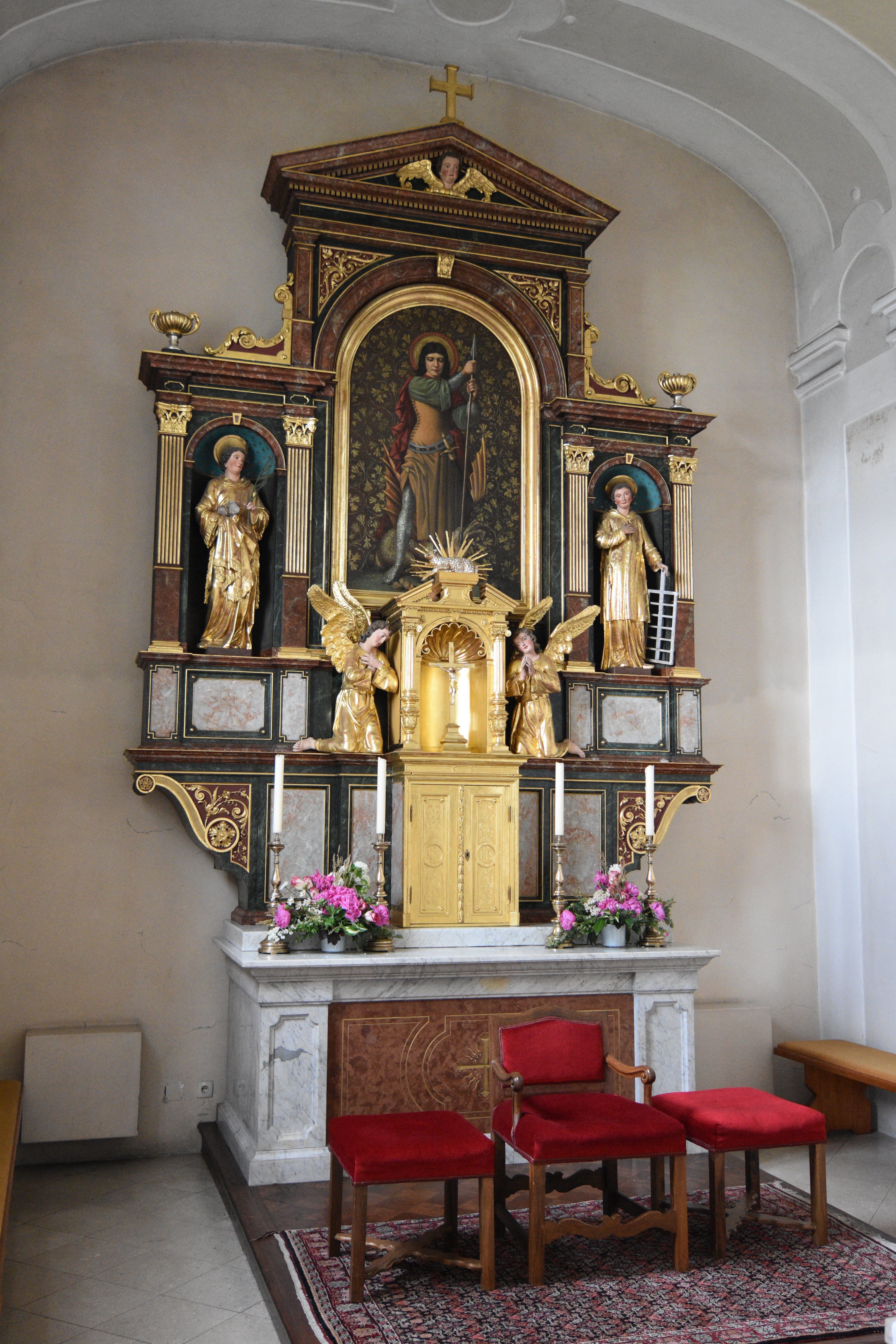 Pfarrkirche Wörth an der Lafnitz - Interior